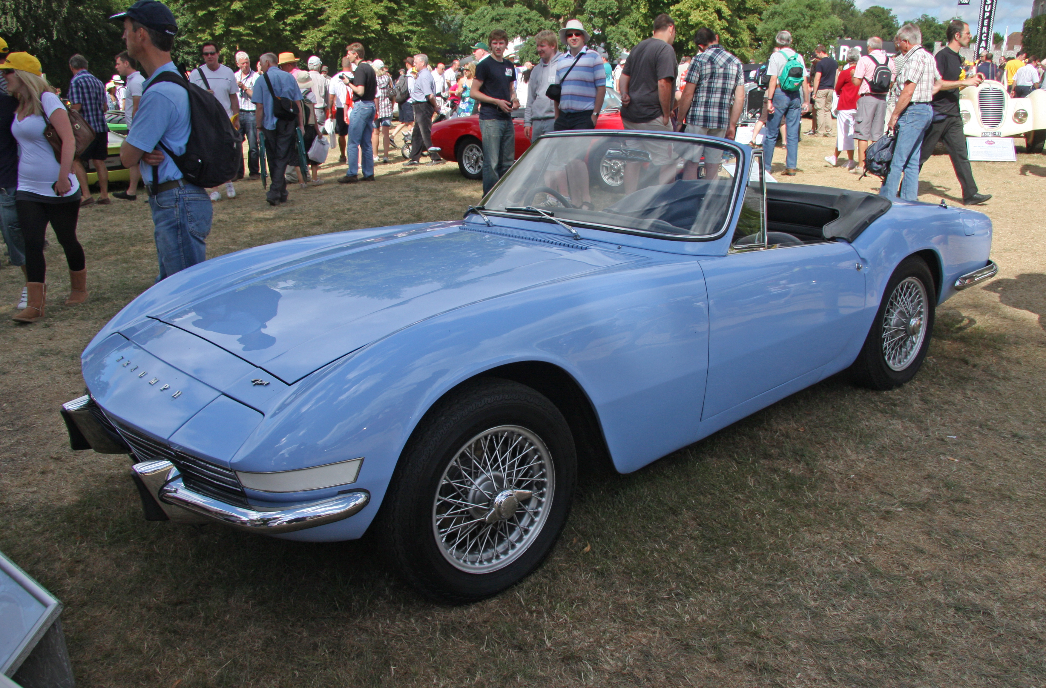 1964 Triumph Fur